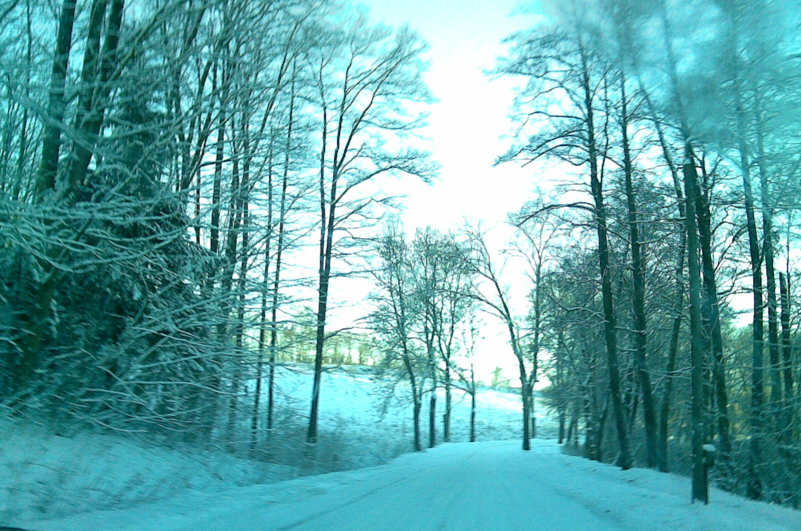 Droga do Pustnik